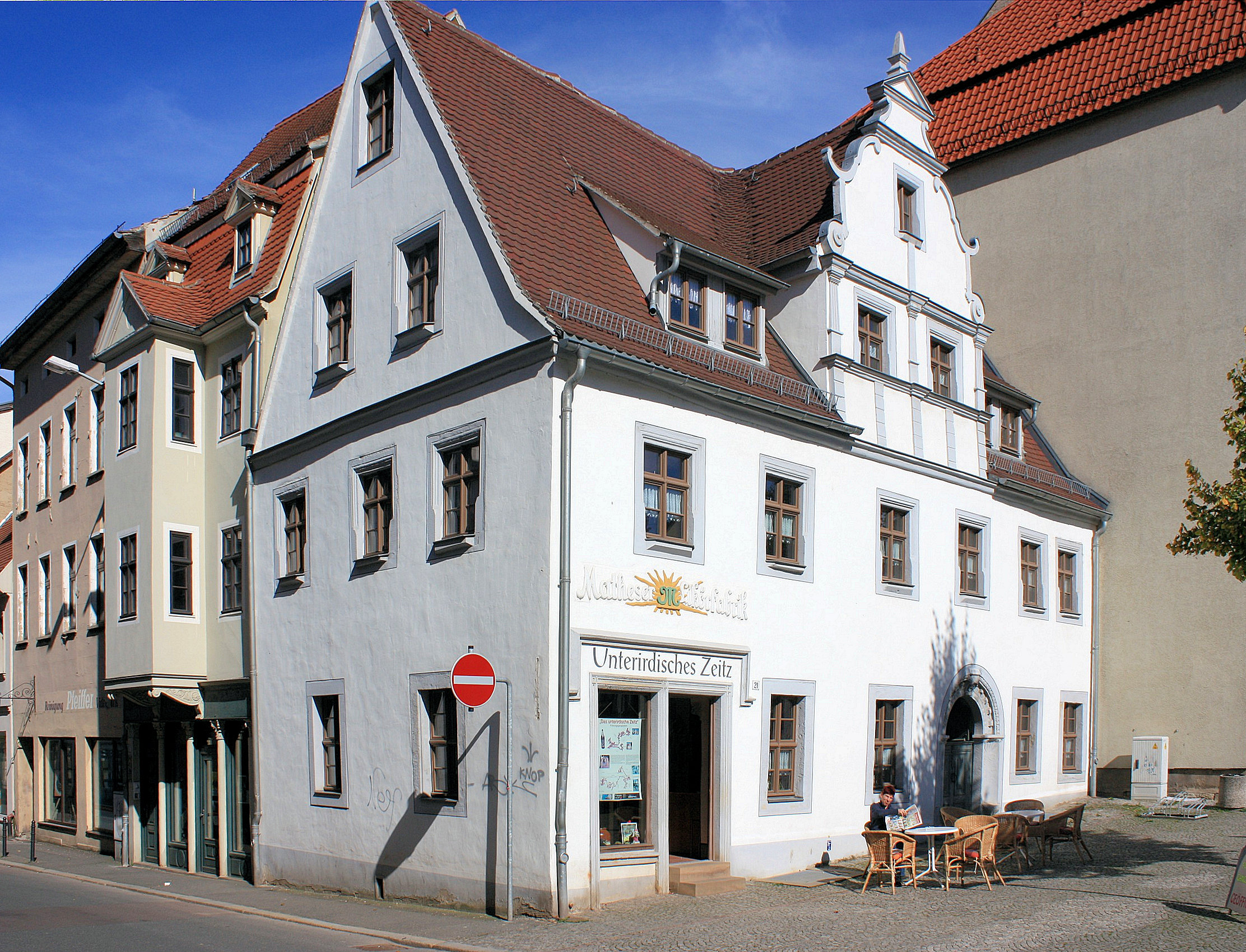 Zeitz, Haus mit Renaissancegiebel Altmarkt 21; Zugang zum Gangsystem "unterirdisches Zeitz", Aufnahme 2010